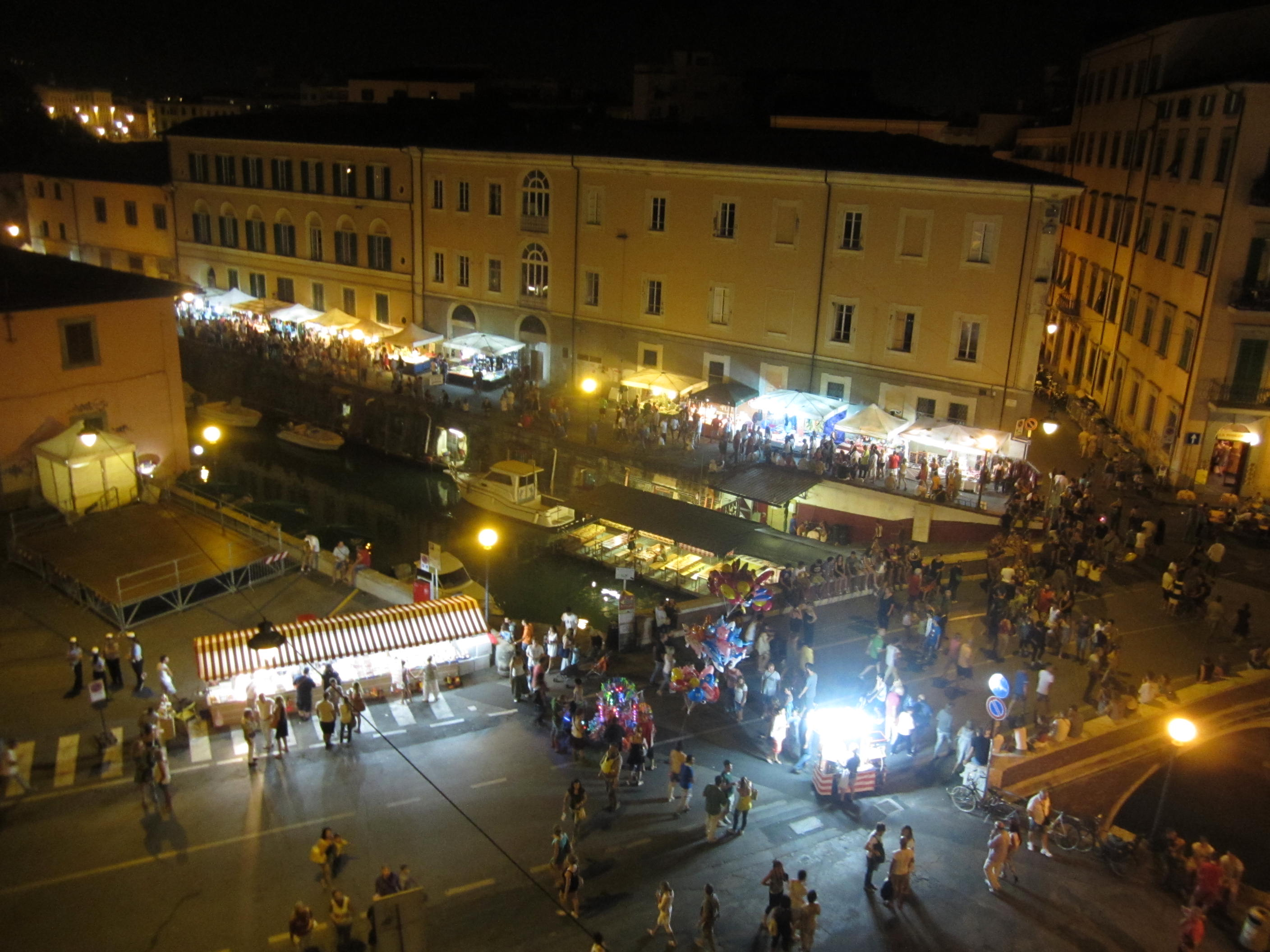 veduta di Effetto Venezia dalla Terrazza Panoramica della Chiesa di Santa Caterina